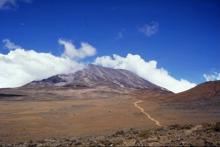 Kilimanjaro National Park - Tanzania